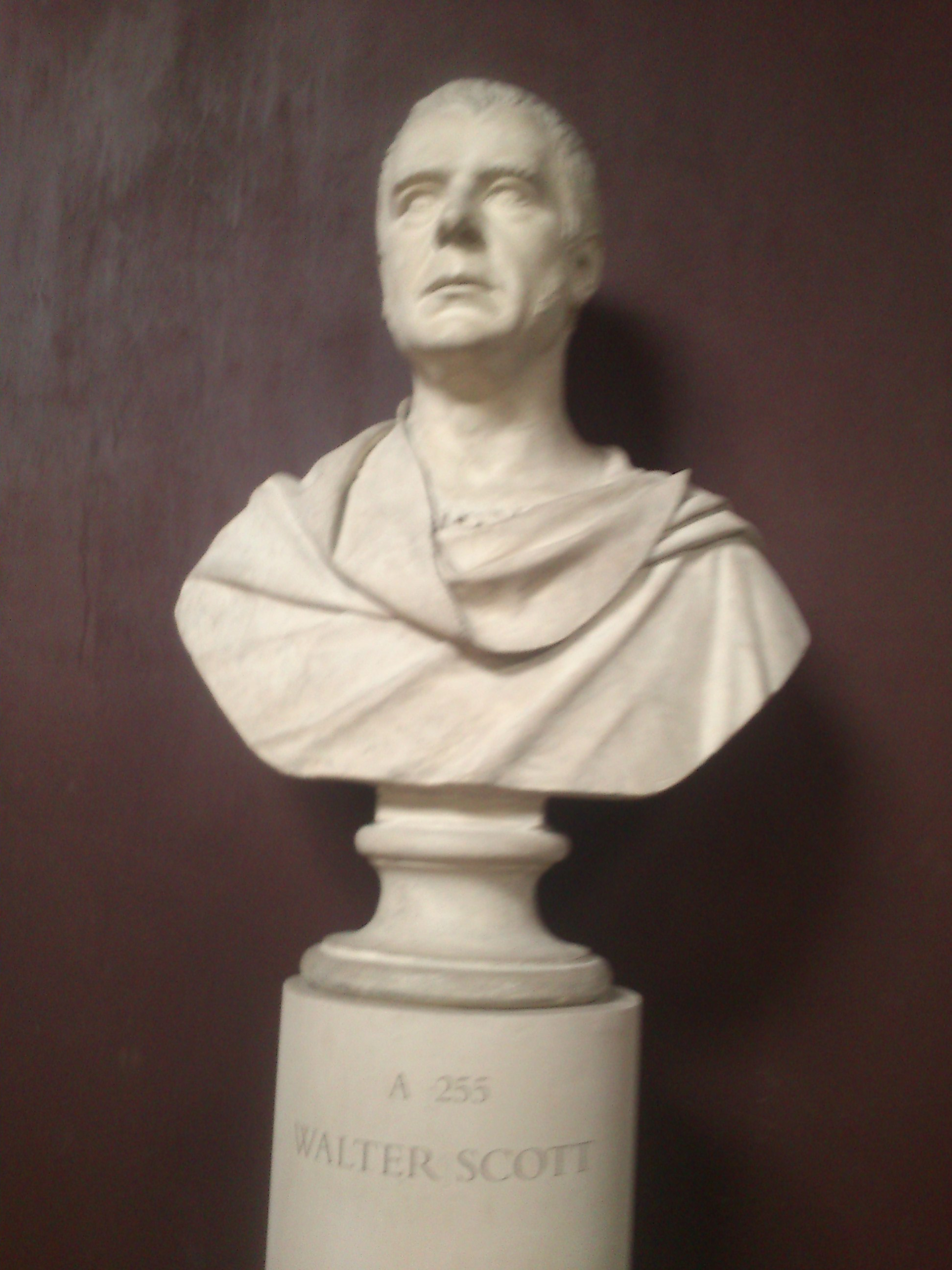 Byste af Walter Scott lavet af Bertel Thorvaldsen